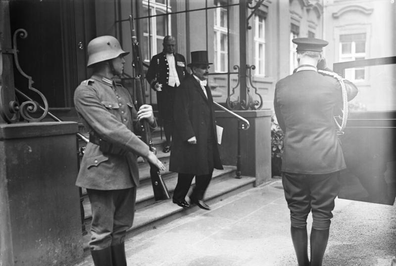 Der neue rumänische Gesandte in Berlin Dr. Georg Tasca wurde vom Reichspräsidenten von Hindenbug zur Überreichung seines Beglaubigungsschreibens empfangen. Der neue rumänische Gesandte in Berlin Dr. Georg Tasca verläßt das Reichspräsidentenpalais in der Wilhelmstr.